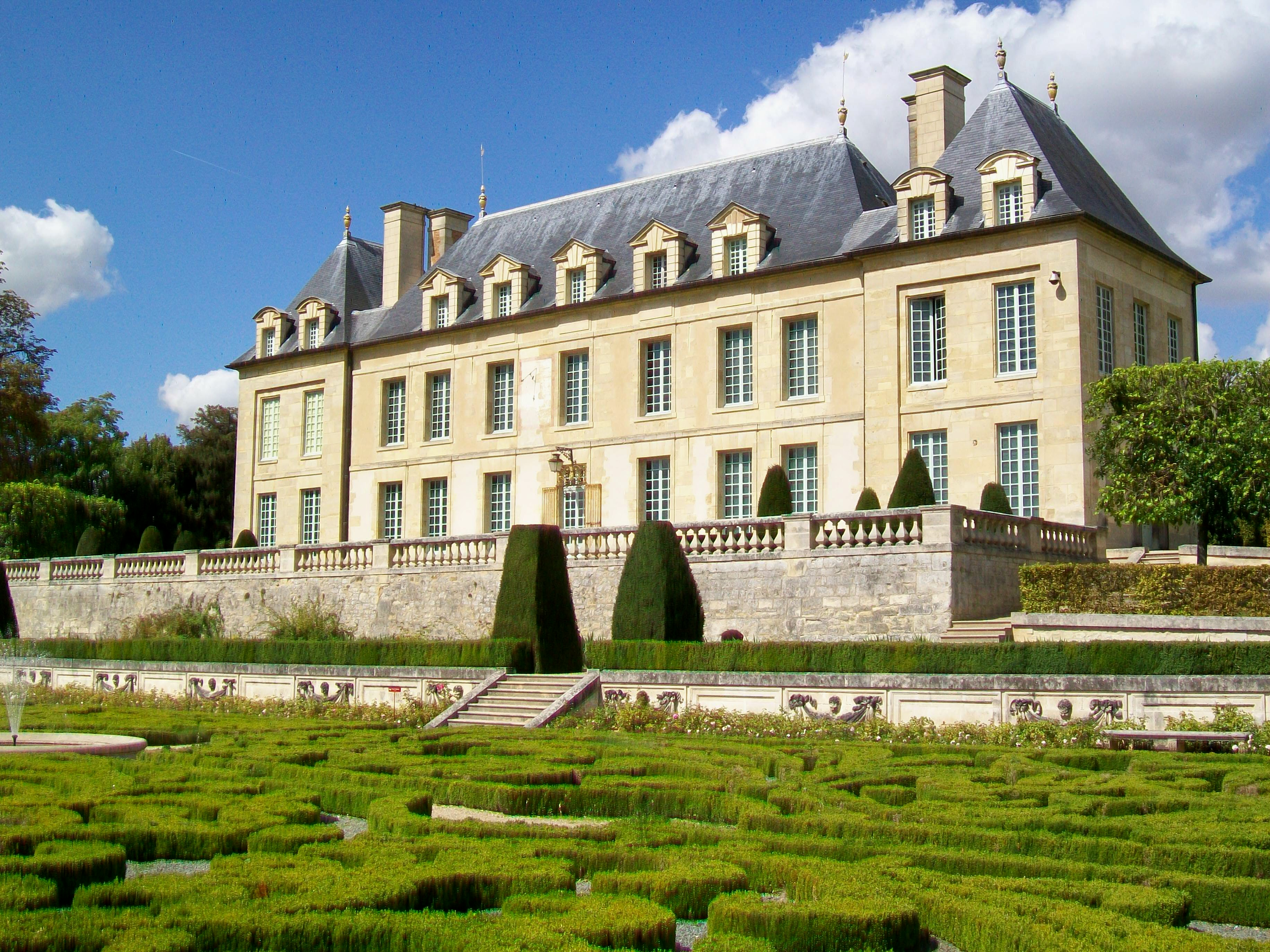 Le château de Leyrit des XVIIe et XVIIIe siècle, plus connu comme le château d'Auvers-sur-Oise, façade sud.